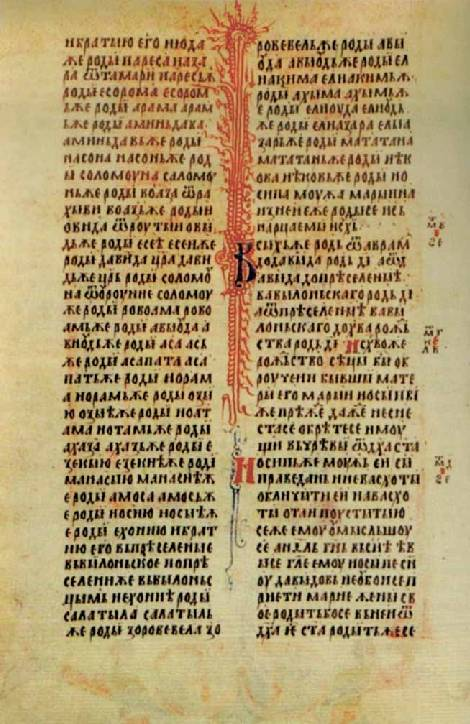 Hvalov zbornik, illustrated slavic manuscript from medieval Bosnia.